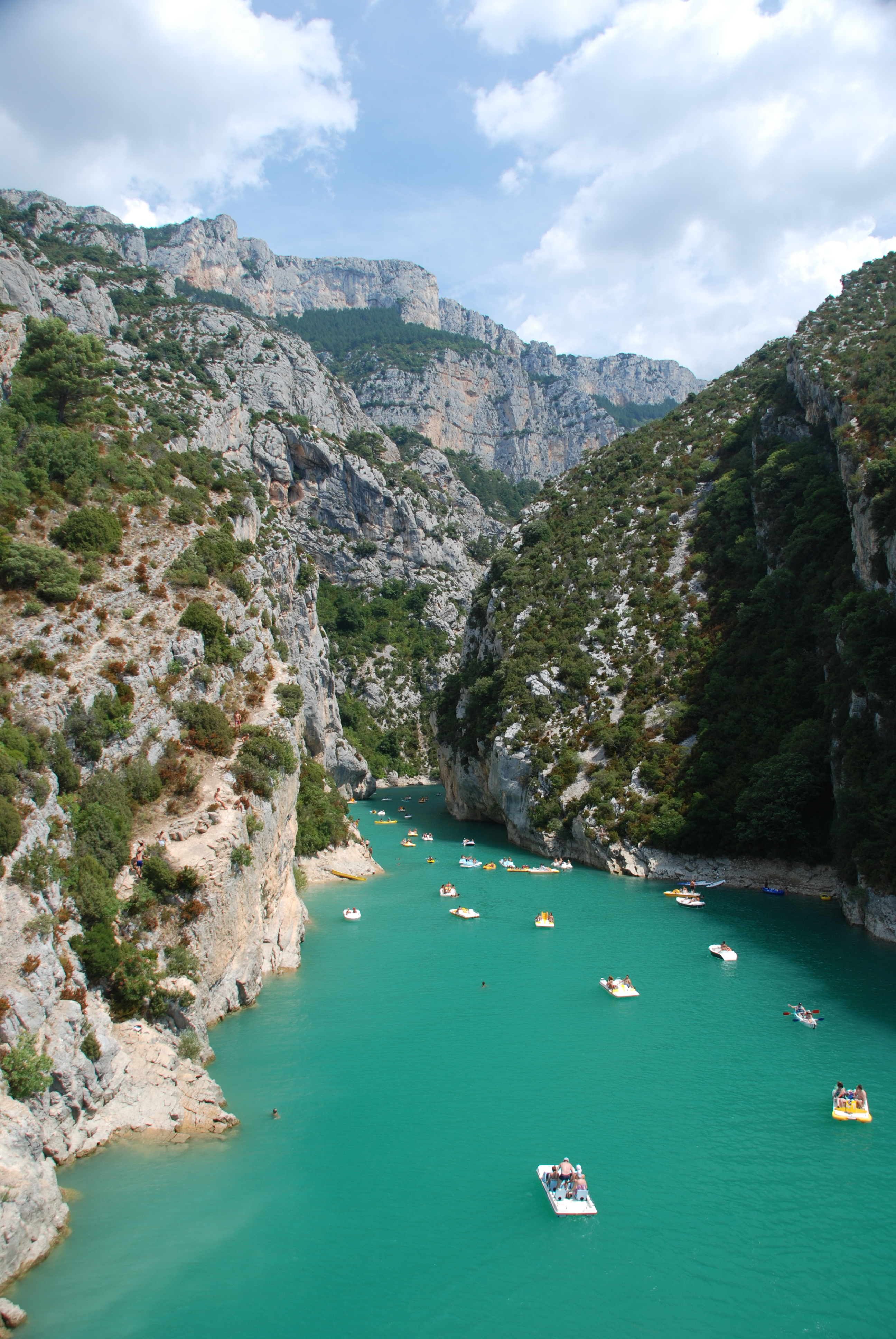 Gorges du Verdon from bridge over Lac de Sainte-Croix, Provence